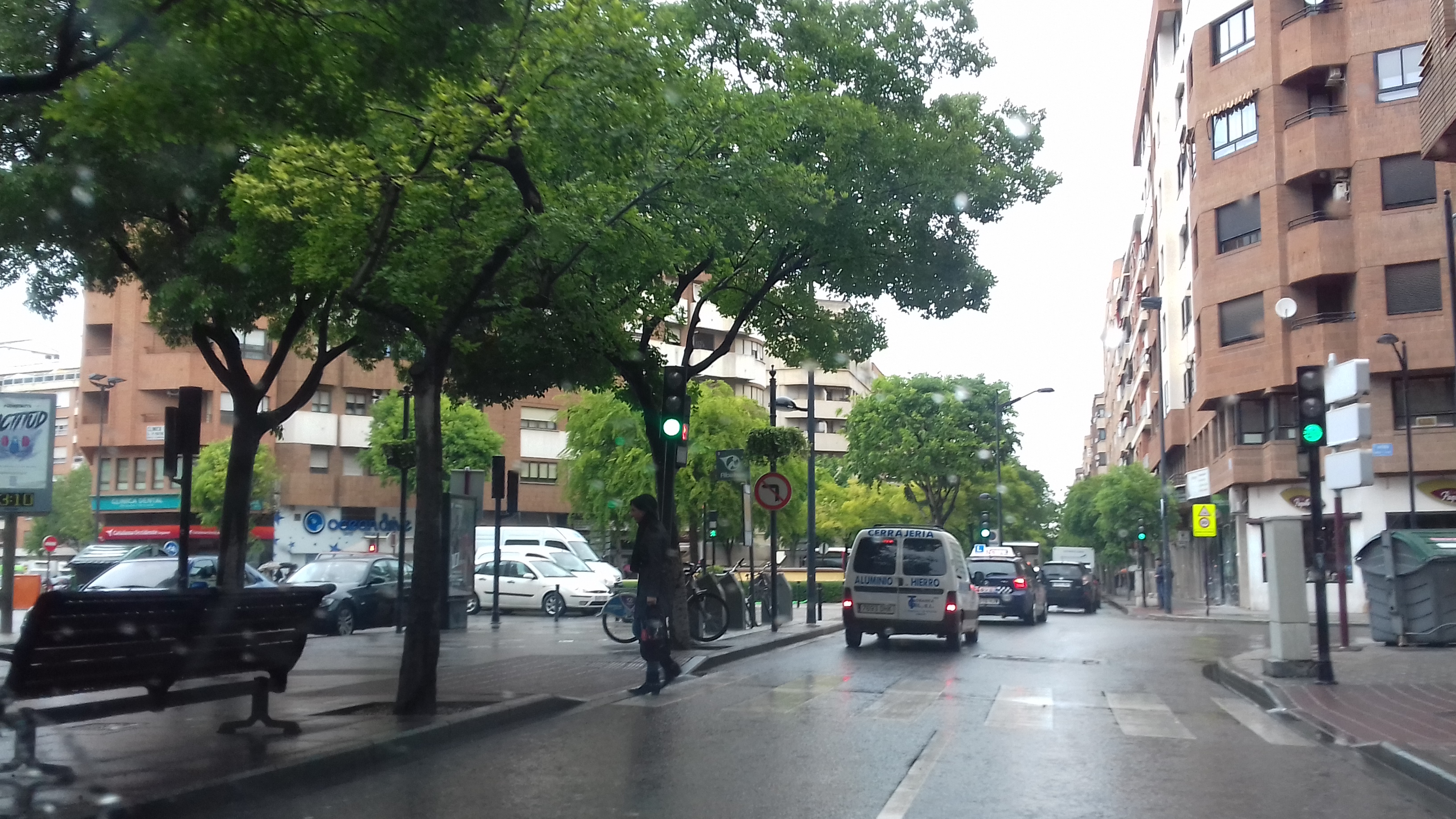 Calles que conforman unos de los centros más importantes de Albacete